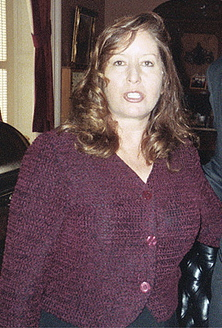 California State Senator Gloria Romero.